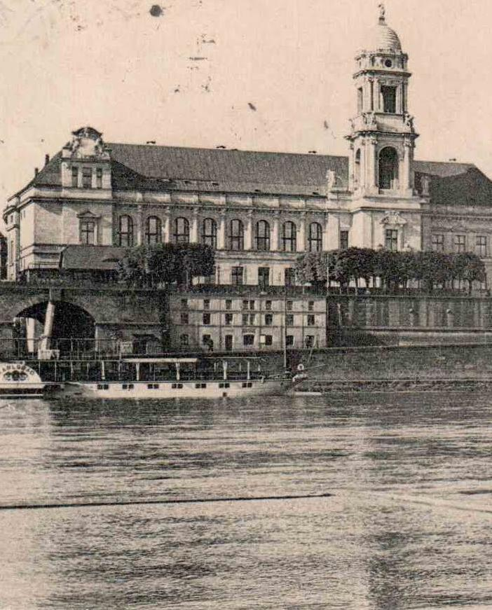 Ausschnitt aus einer Postkarte von 1903: Sächsisches Ständehaus an der Brühlschen Terrasse und Schiffahrtsgebäude am Terrassenufer